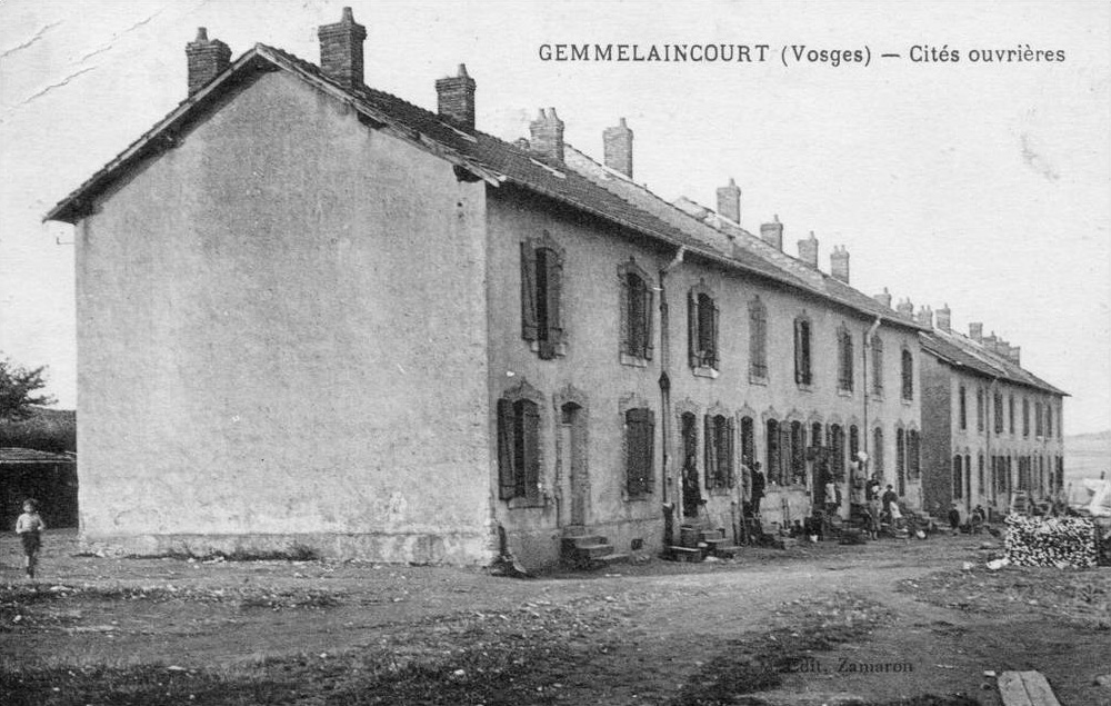 La cité minière des houillères de Gemmelaincourt.